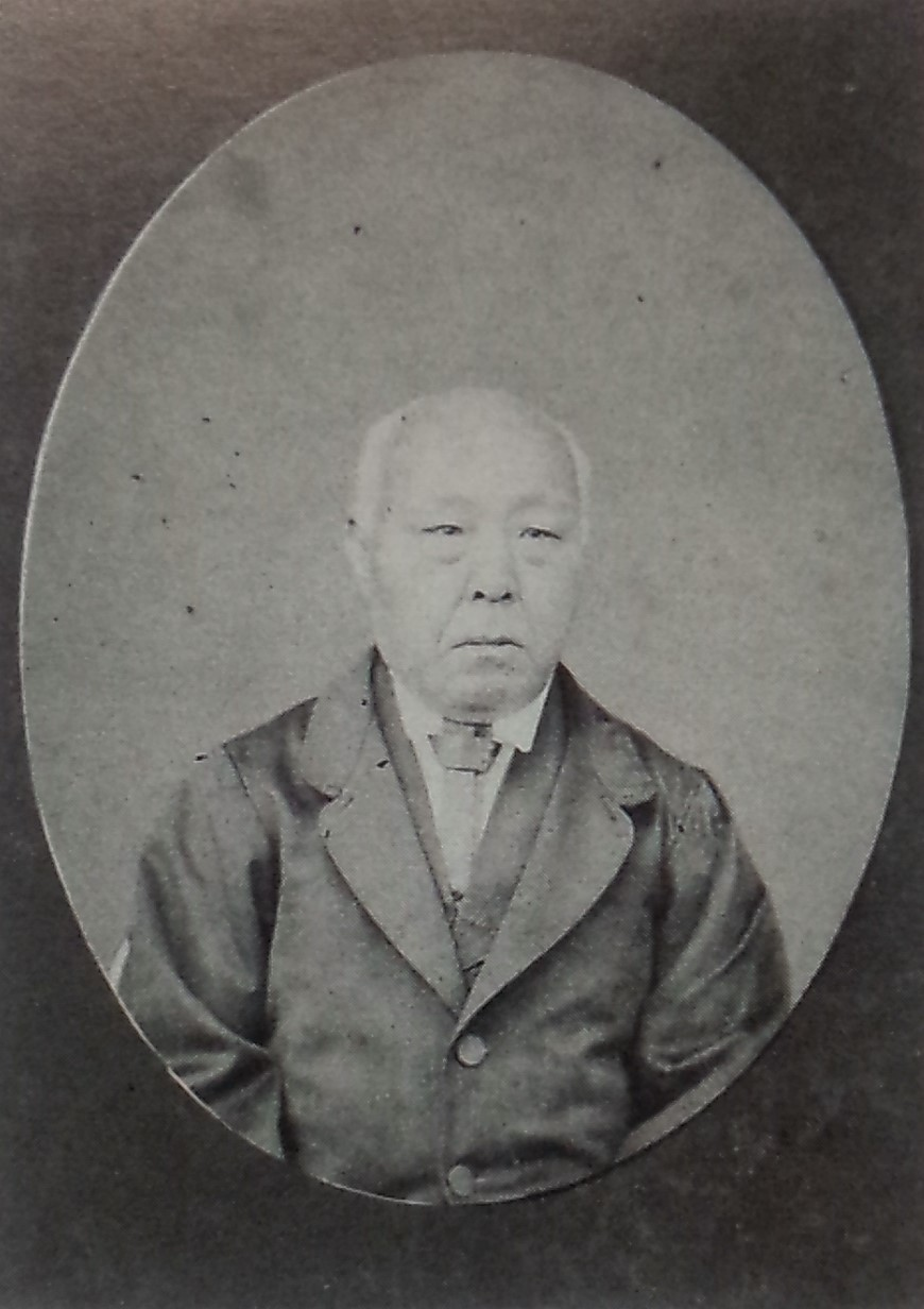 東園基敬の肖像写真。